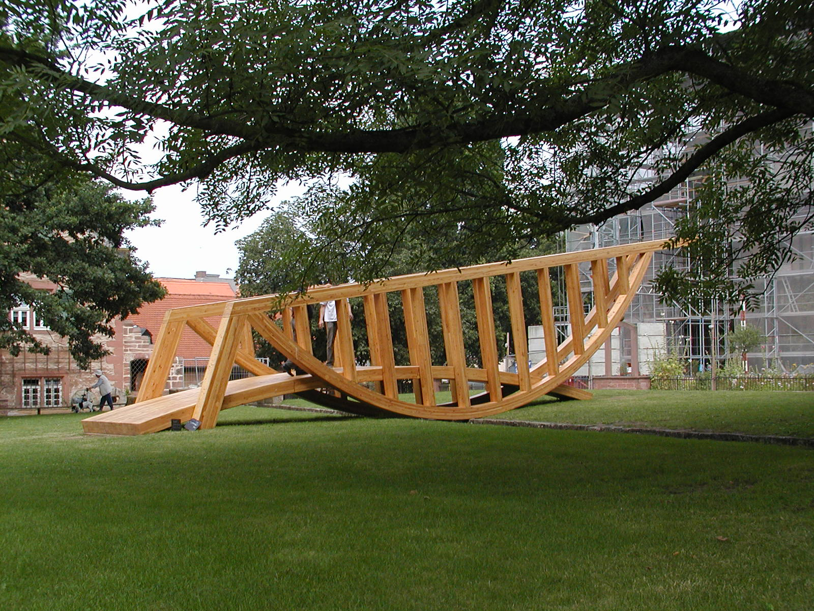 Die Brücke im Park